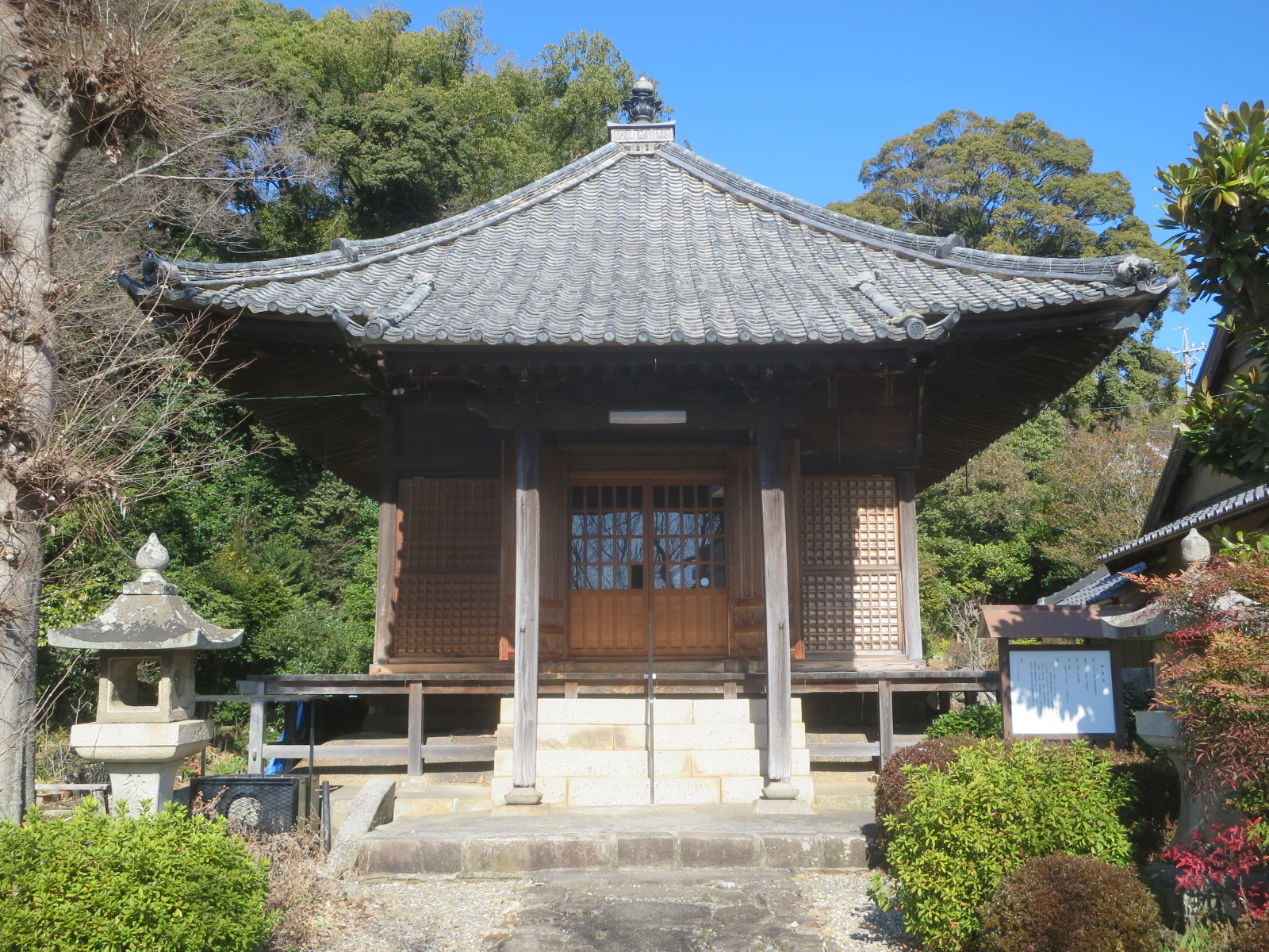 甲山寺の秋葉堂（岡崎市六供町）